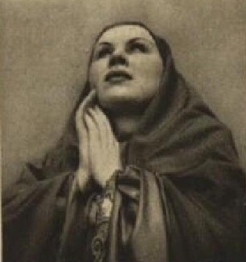 Zdenka Hrnčířová (1913-1984), česká pěvkyně, sopranistka a mezzosopranistka